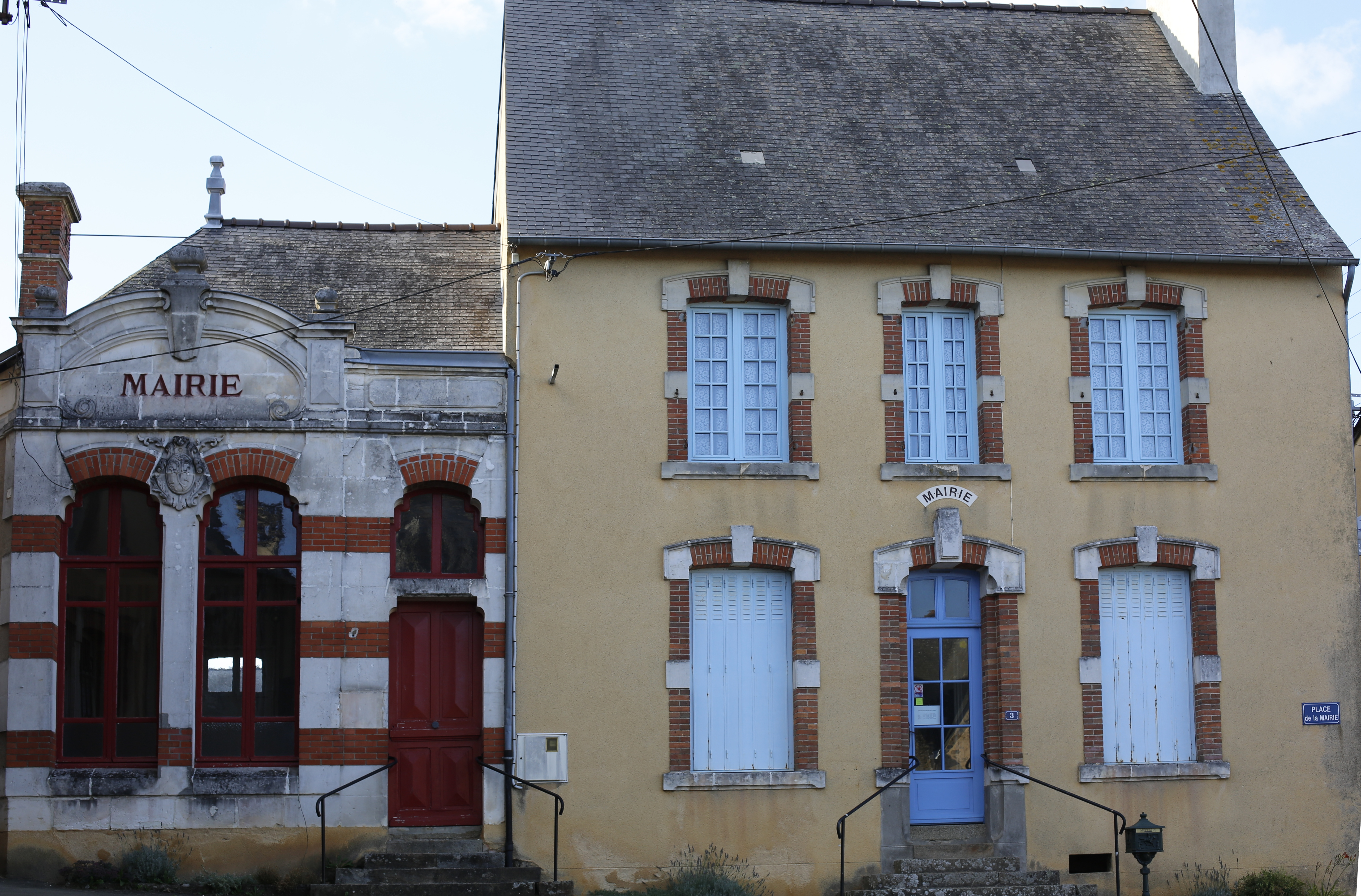 Mairie de Saint-Martin-de-Connée.